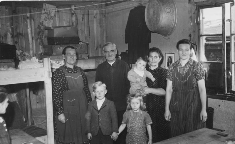 Flüchtlingslager in Bayern Hof Moschendorf